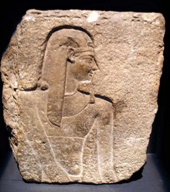 Fragment de bas-relief du temple de Cléopâtre et Césarion, Coptos, I° siècle av. JC